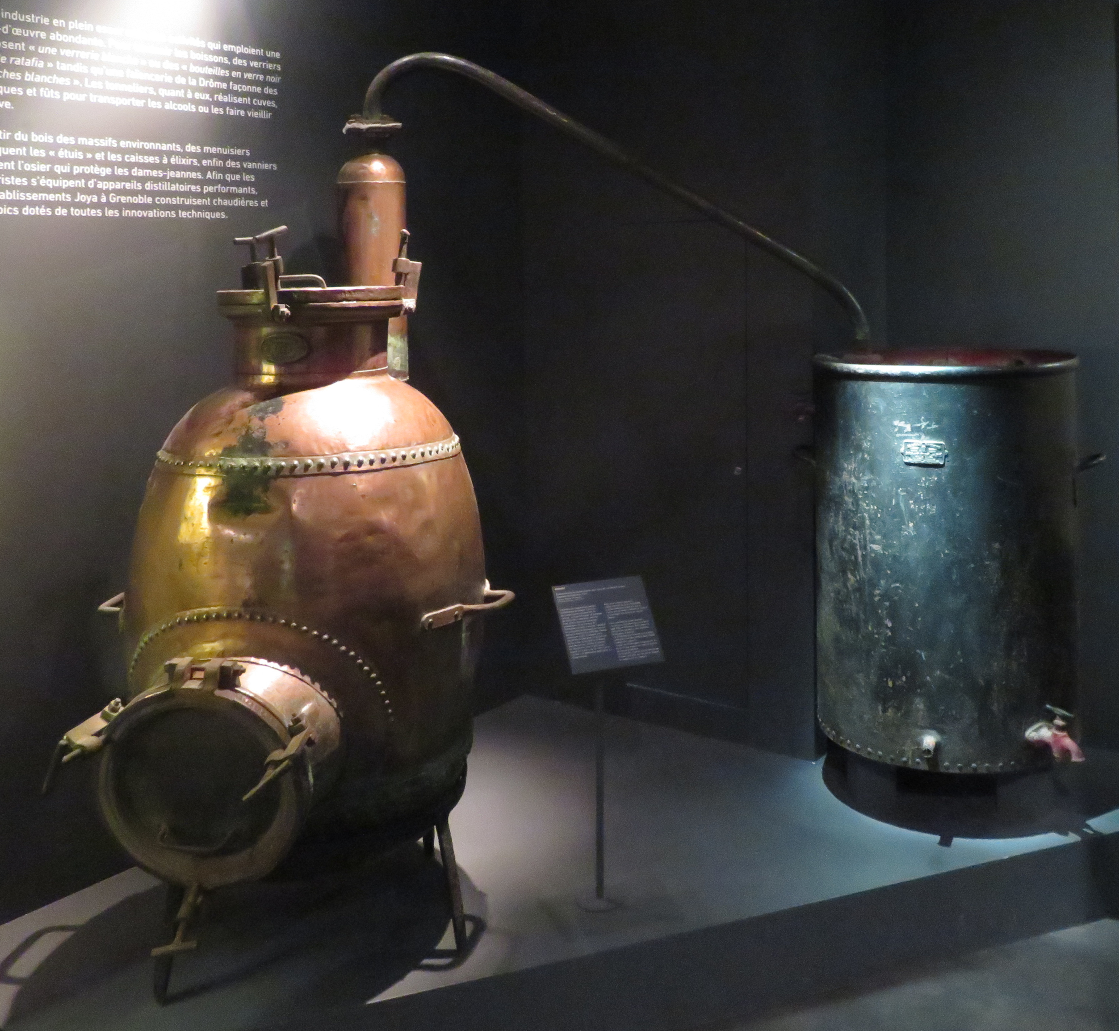 Alambic Joya, construit entre 1850 et 1925. Exposition L'Ivresse des Sommets, Musée Dauphinois, Grenoble, France Alambic complet